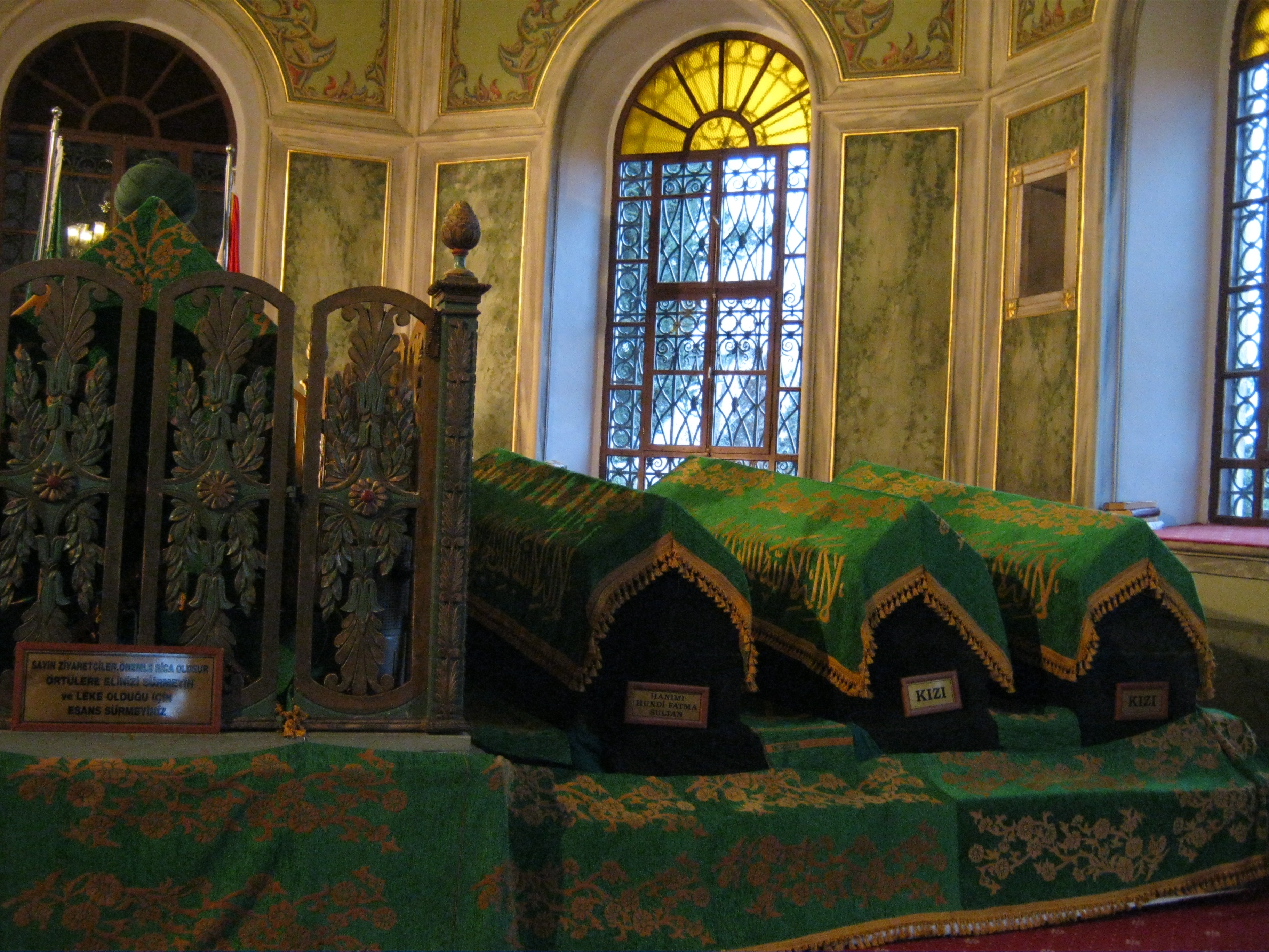 emirsultan türbesi bursa